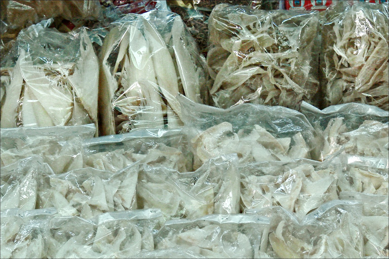 Ailerons de requins en vente sur le grand marché de Cho Lon Cho Lon (Grand Marché) est le coeur commerçant de la ville, il a été développé par les chinois dès la fin du XVIIIème siècle. Cho Lon a été rattaché à Saigon en 1874. De nombreuses personnes par le monde s'opposent à la pêche de requins uniquement pour leur couper les ailerons qui se vendent très chers sur tous les marchés asiatiques. Article de Wikipedia sur les ailerons de requins